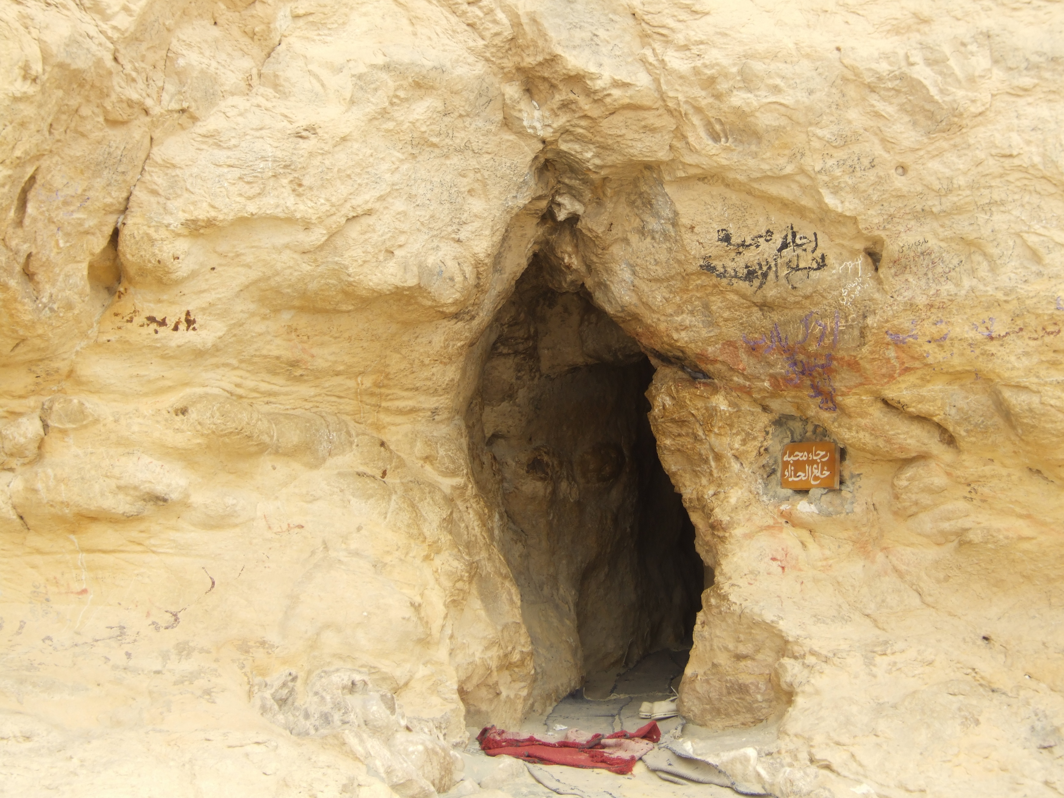 Monastero di sant'Antonio abate (Egitto) Grotta dove il Santo viveva